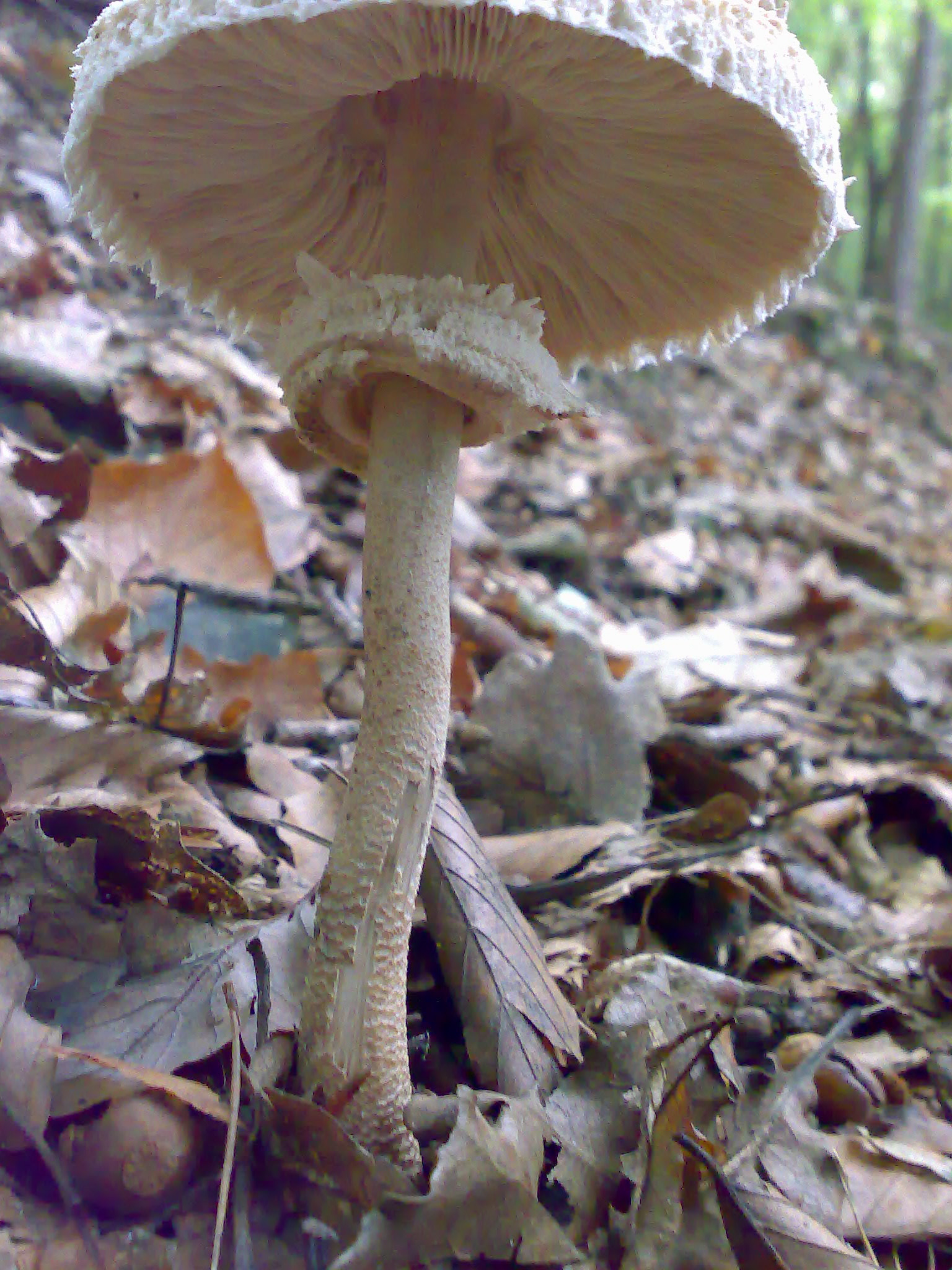 Parasol (Macrolepiota procera)